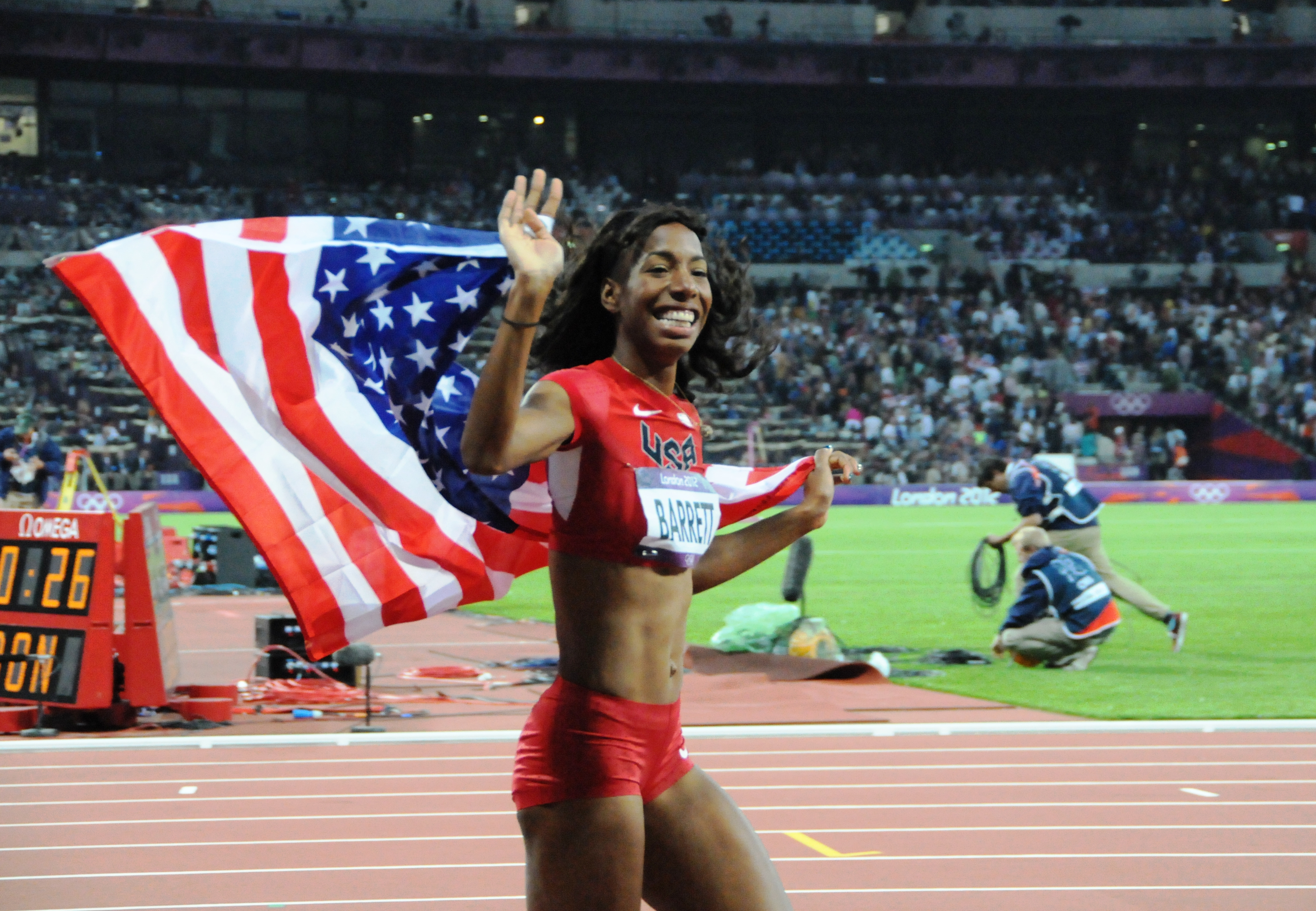 La sauteuse américaine: Brigetta Barrett dans son tour d'honneur pour sa médaille d'argent dans le saut en hauteur